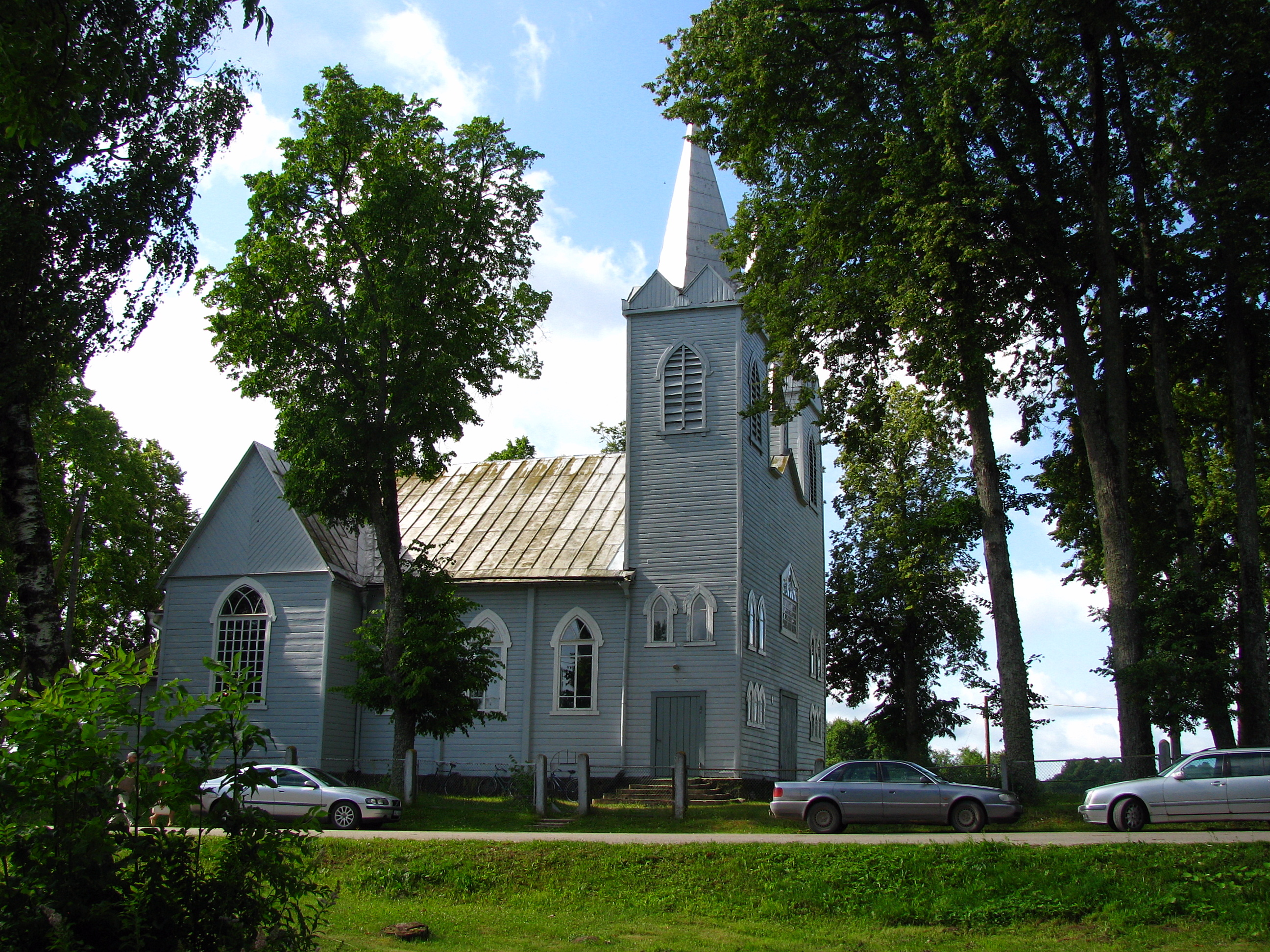 Ņukšu baznīca. Church at Ņukši. July, 2015